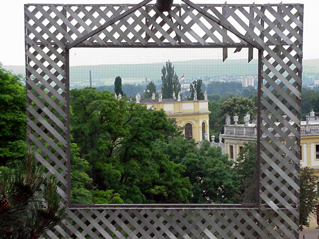 Kassel, Landschaft im Dia, Dieses Werk wurde vom Künstlerkollektiv Haus Rucker und Co anlässlich der documenta 6 geschaffen